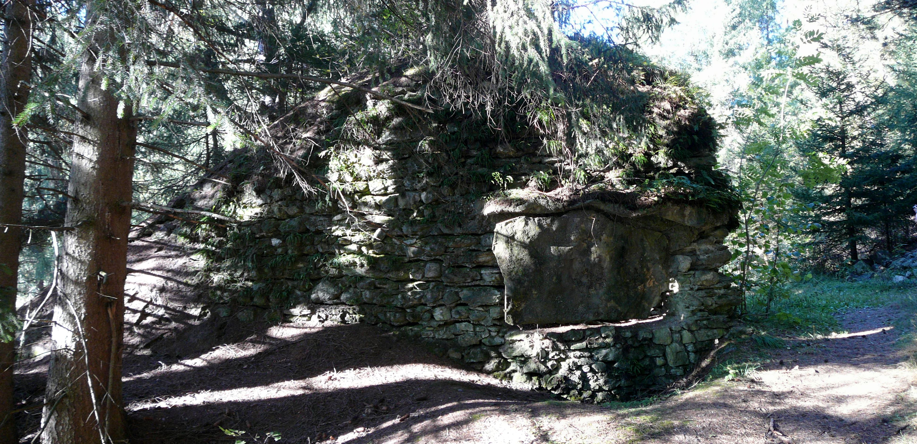 Valdaora Opera 6